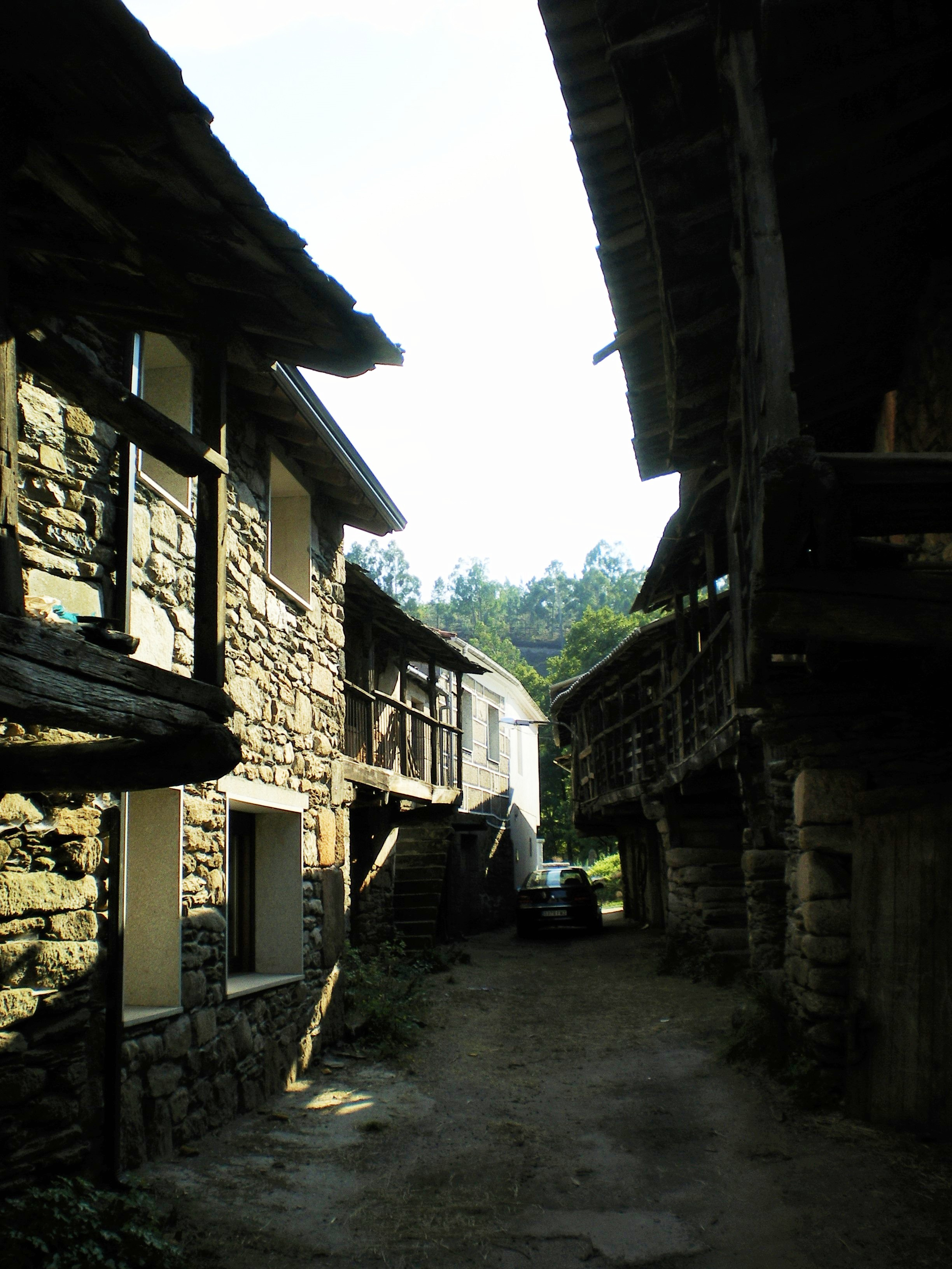 Soutelo Verde - Calle con casas antiguas conservadas